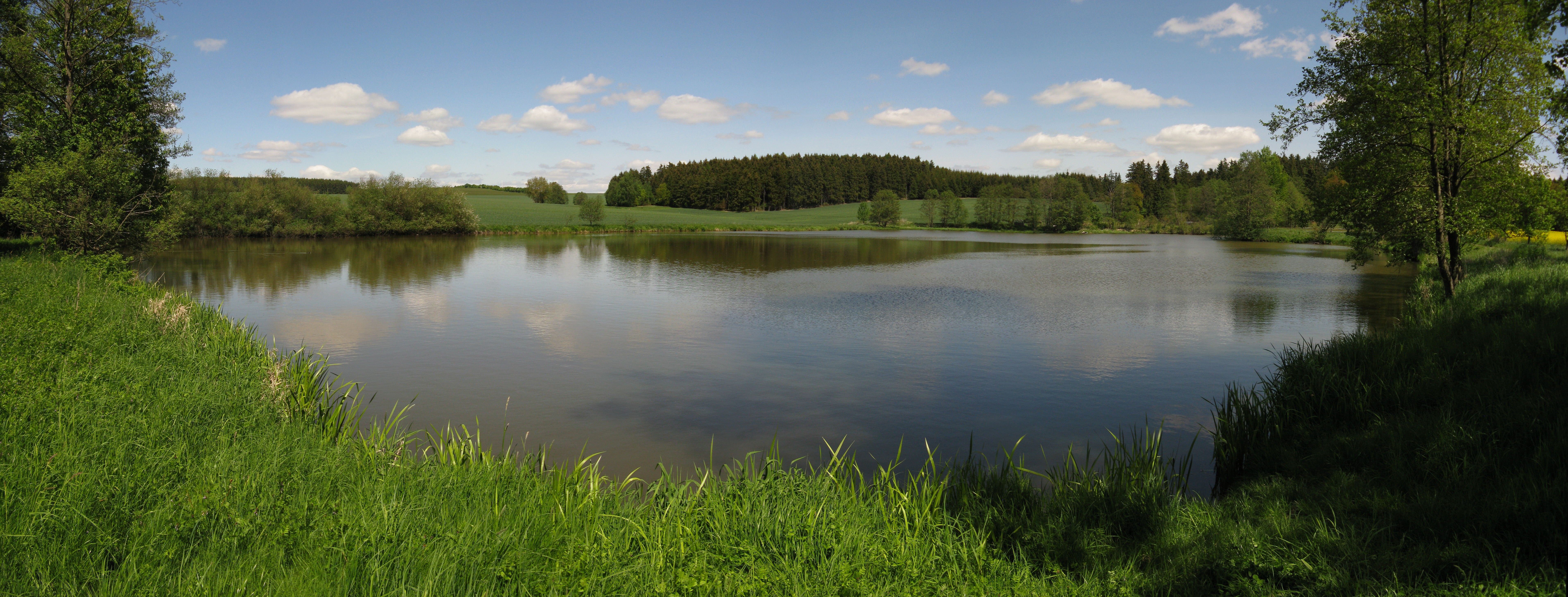 Ein Teich in Dreba im Dreba-Plothener Teichgebiet (Thüringen); außerhalb der Schutzgebiete